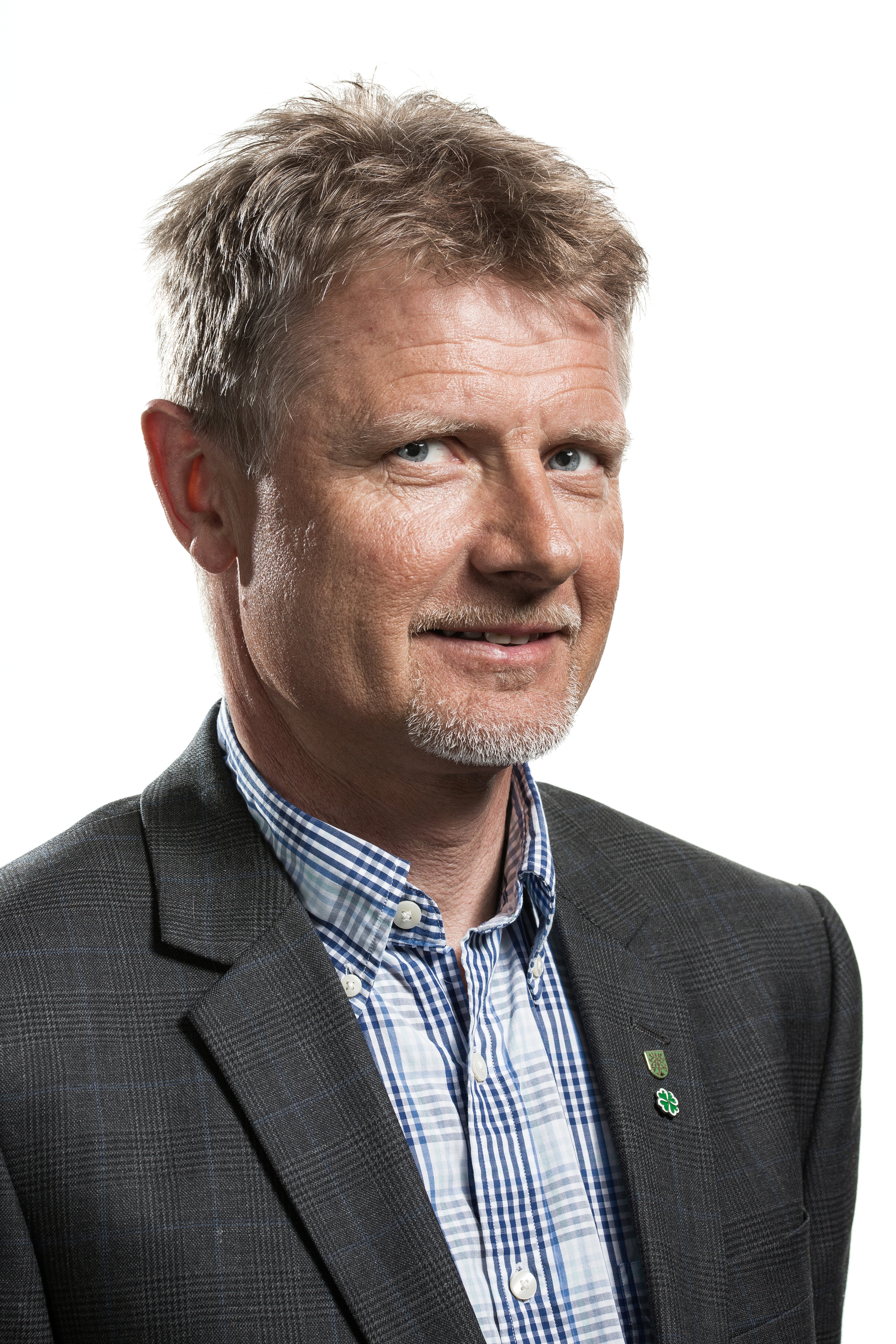 Thor Jørgen Tjørhom, Vest-Agder